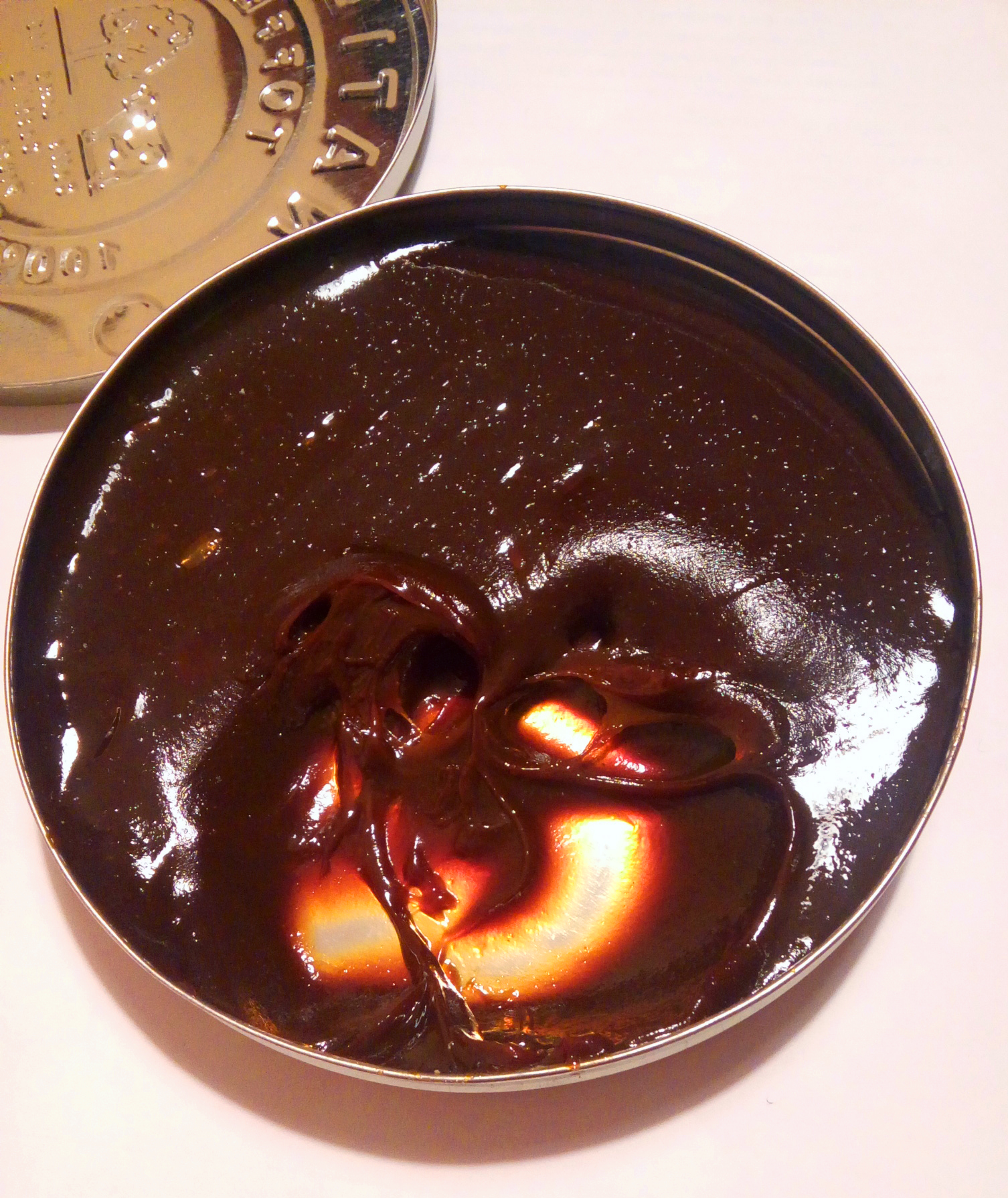 Postre típico de los departamentos de la costa norte del Perú, como Tumbes o Piura. A diferencia de la natilla española, la peruana está hecha a base de miel de chancaca y leche.